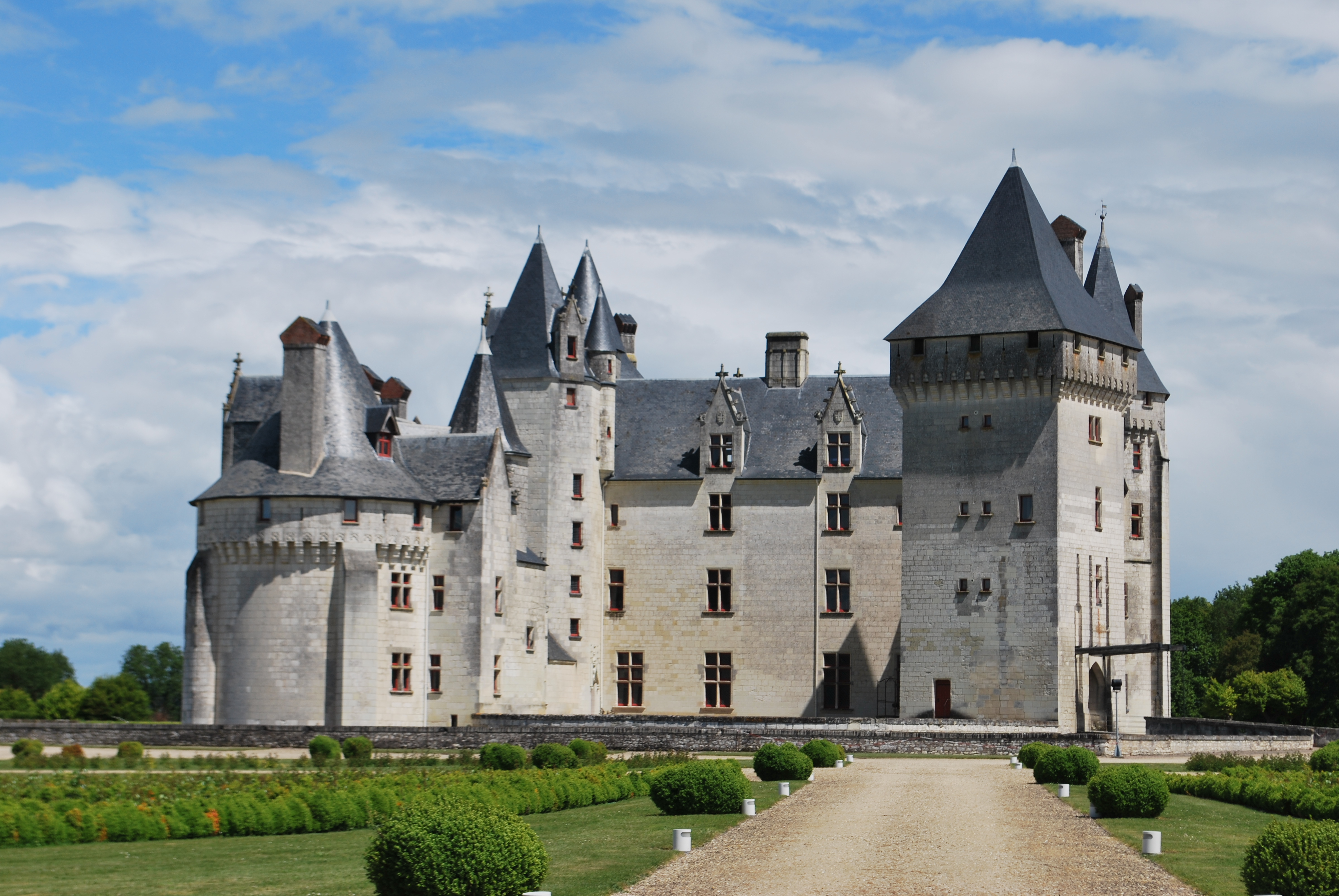 Prise de vue du château du Coudray-Montpensier réalisée devant le grand portail.